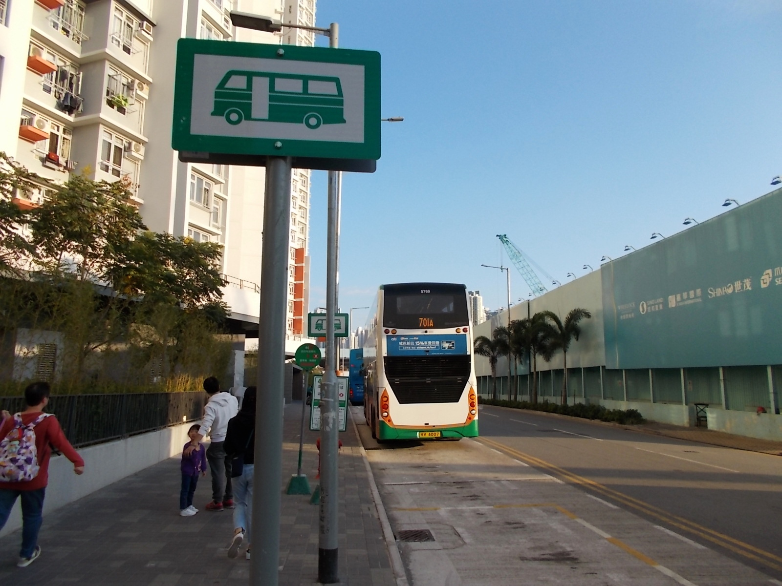 海盈邨巴士總站